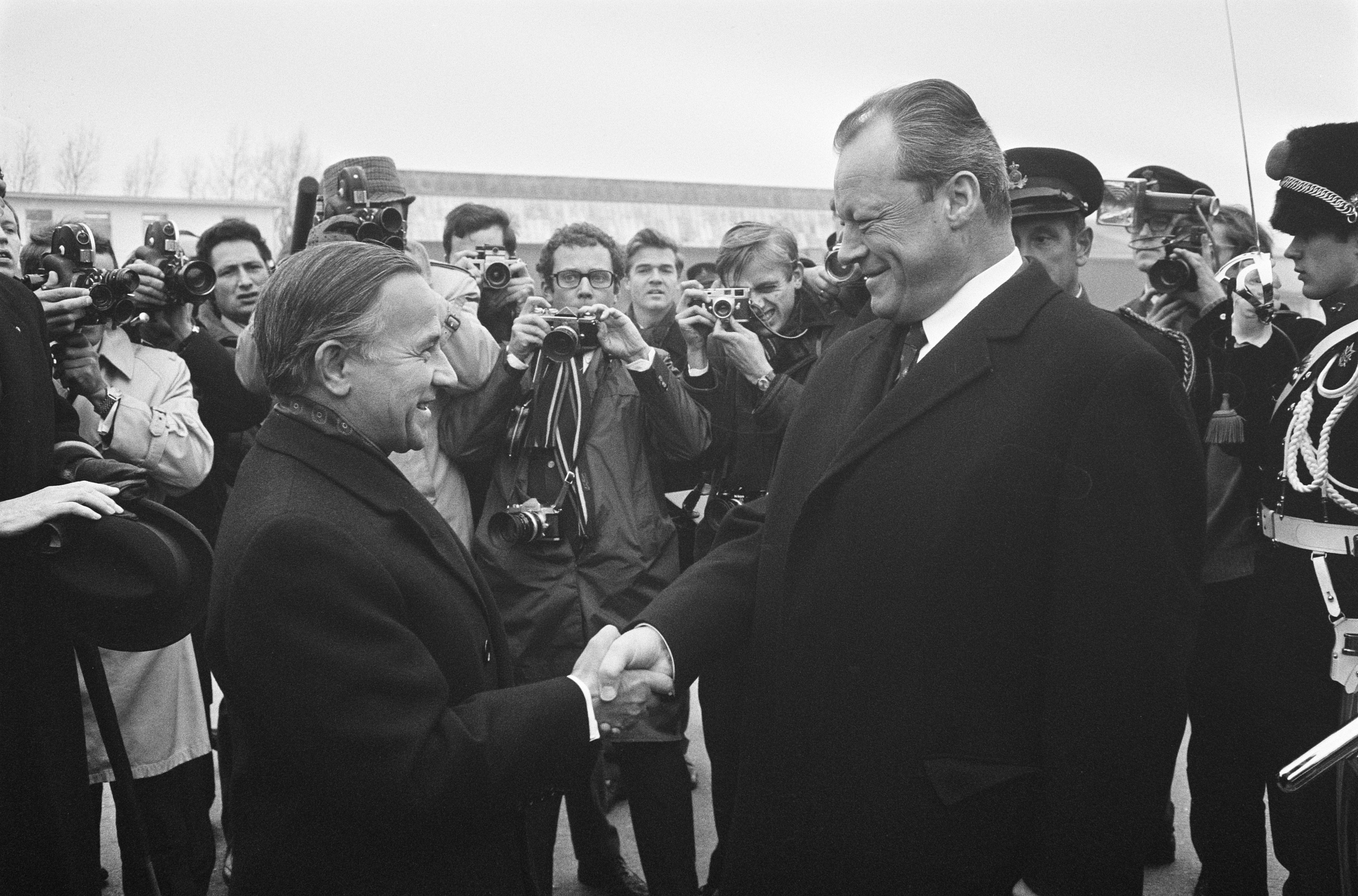 Collectie / Archief : Fotocollectie Anefo Reportage / Serie : [ onbekend ] Beschrijving : Aankomst Bondskanselier Willy Brandt van Duitsland op Ypenburg. Aankomst Brandt Datum : 1 december 1969 Trefwoorden : aankomsten Persoonsnaam : Bondskanselier Willy Brandt Fotograaf : Koch, Eric / Anefo Auteursrechthebbende : Nationaal Archief Materiaalsoort : Negatief (zwart/wit) Nummer archiefinventaris : bekijk toegang 2.24.01.05 Bestanddeelnummer : 923-0345